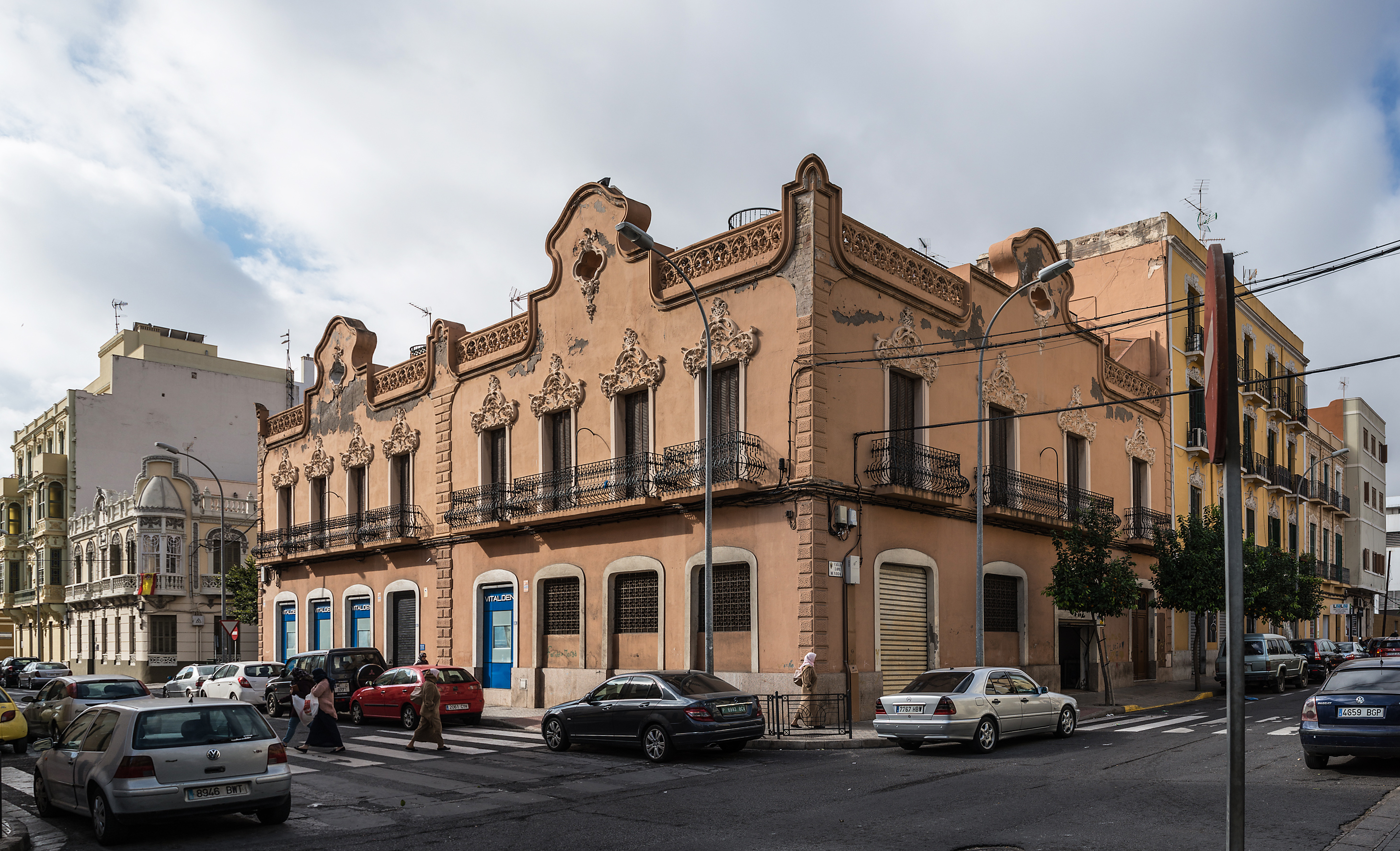 Muebles La Reconquista es un edificio de estilo modernista de la ciudad española de Melilla, situado en la calle Cardenal Cisneros1​2​y forma parte del Conjunto Histórico Artístico de la Ciudad de Melilla, un Bien de Interés Cultural. Enrique Nieto 1910.